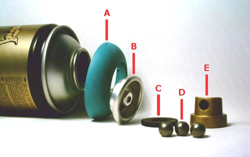 Sprühdose / Montana Gold Can Bestandteile / Bildquelle: selbst fotografiert A - "Donut", Kunststoffring im Farbton der Abfüllung B - Ventilsystem mit Steigrohr (Detailerklärung s. u.) C - Sprühsicherungsring D - Mischkugeln E - Sprühventil